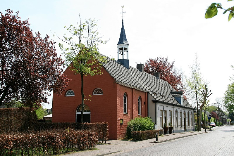 Hoogeloon - Hoofdstraat 68 - Protestants kerkje